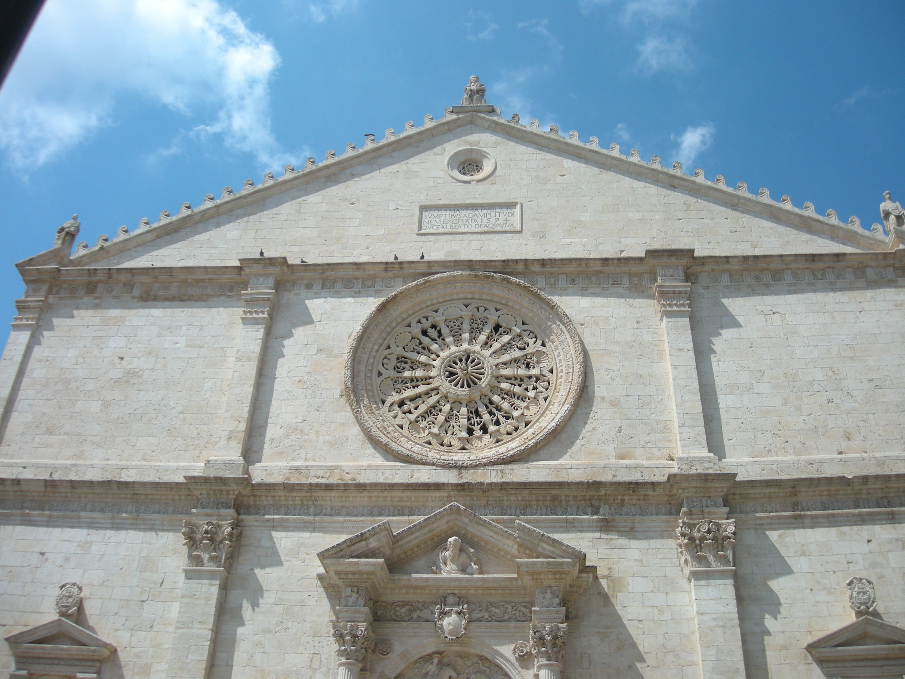 Facciata della cattedrale di Acquaviva delle Fonti (BA)